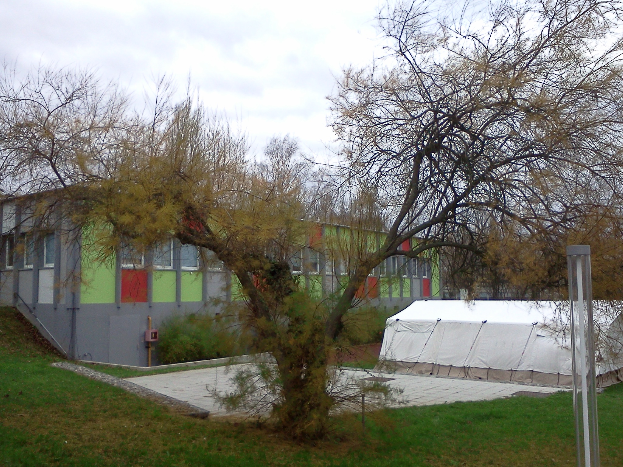 Tamarix devant un bâtiment de l'IFTH (Institut Français du textile et de l'habillement) situé sur le Campus de l'Illberg à Mulhouse, France.